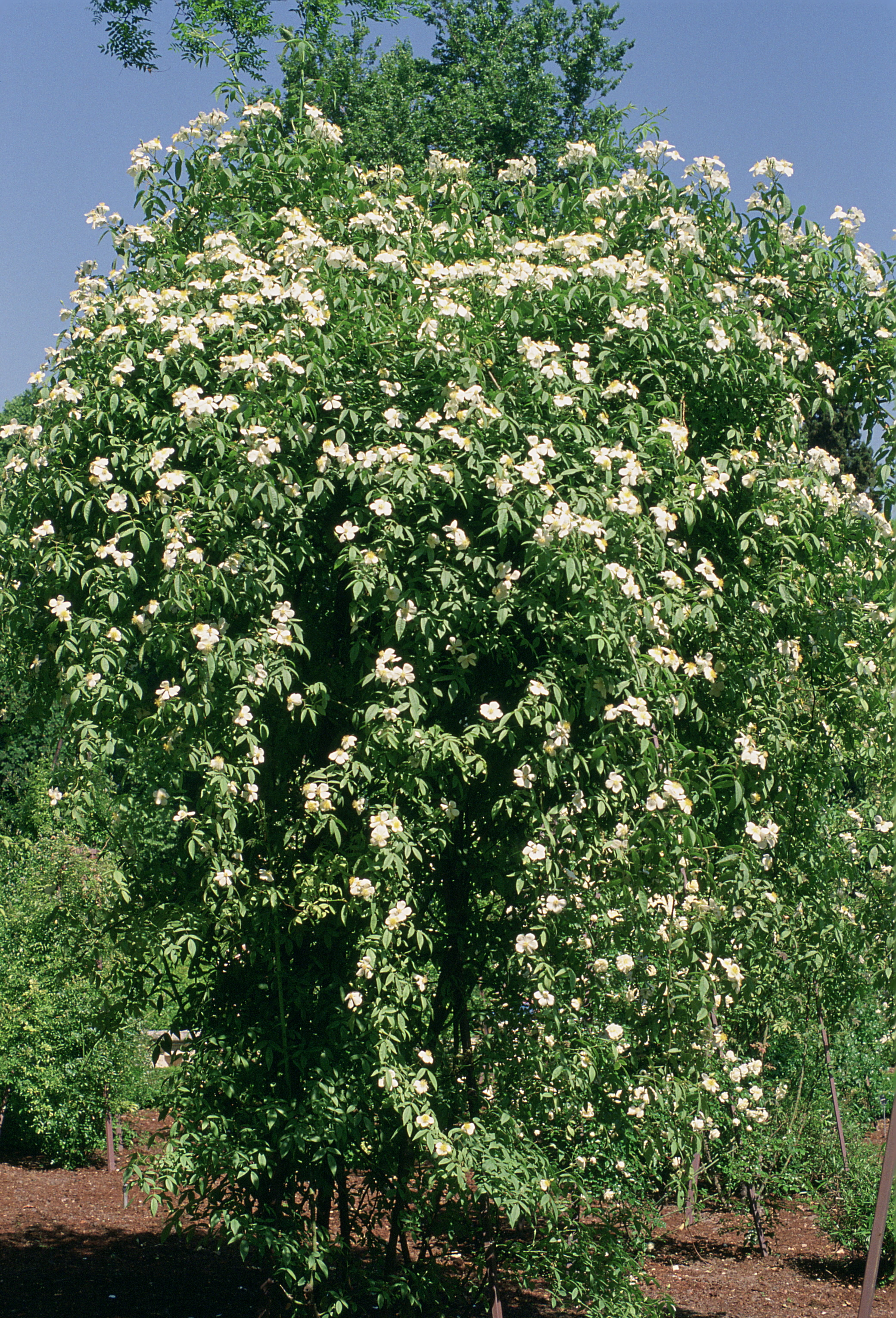 Rosa 'La Mortola', gr. Moschata, sect. Synstylae. Real Jardín Botánico, Madrid